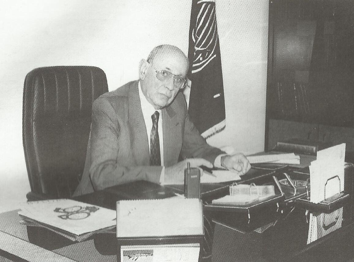 النائب السابق في البرلمان اللبناني عبد المجيد الزين